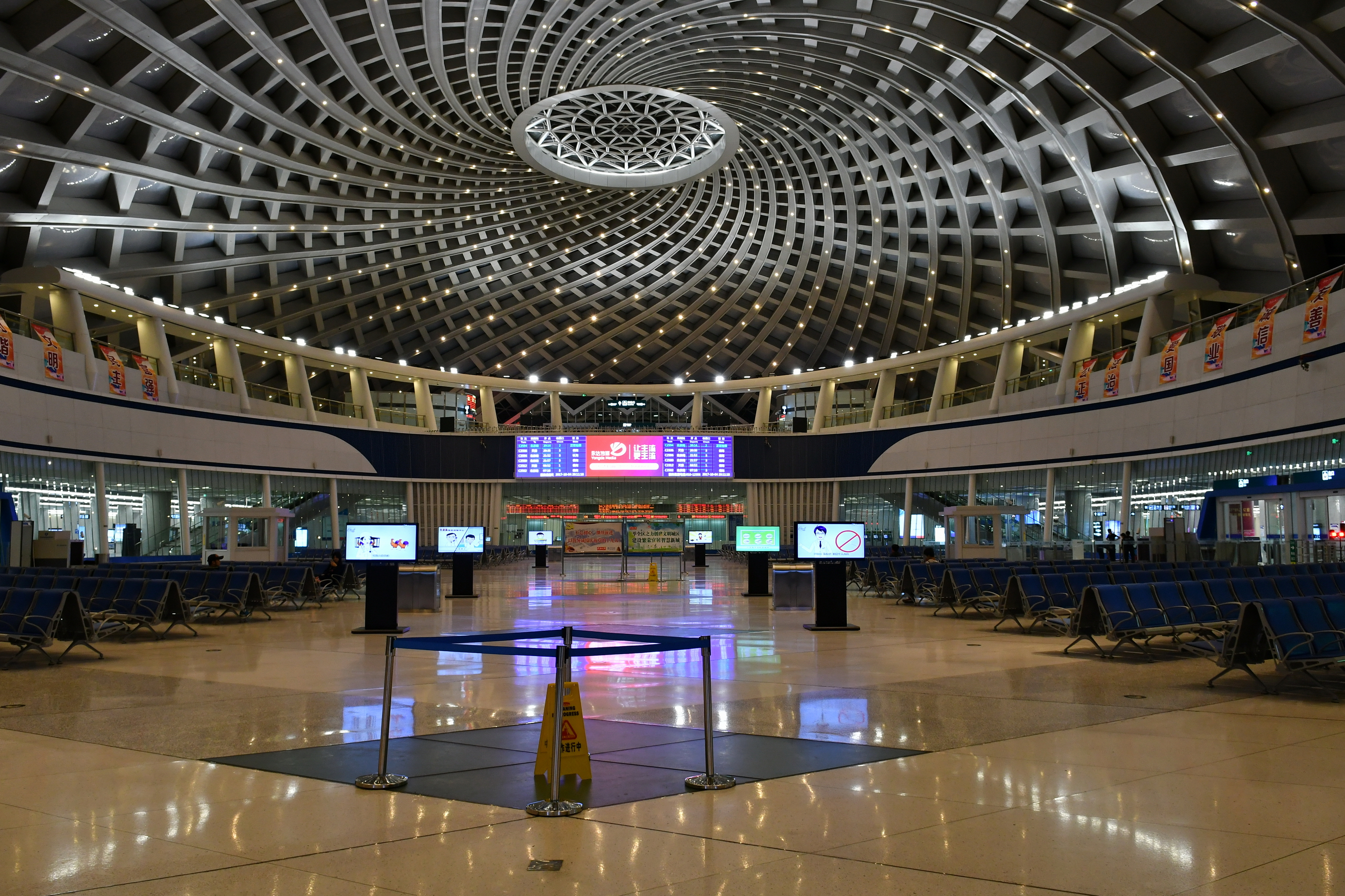 于家堡火车站候车大厅